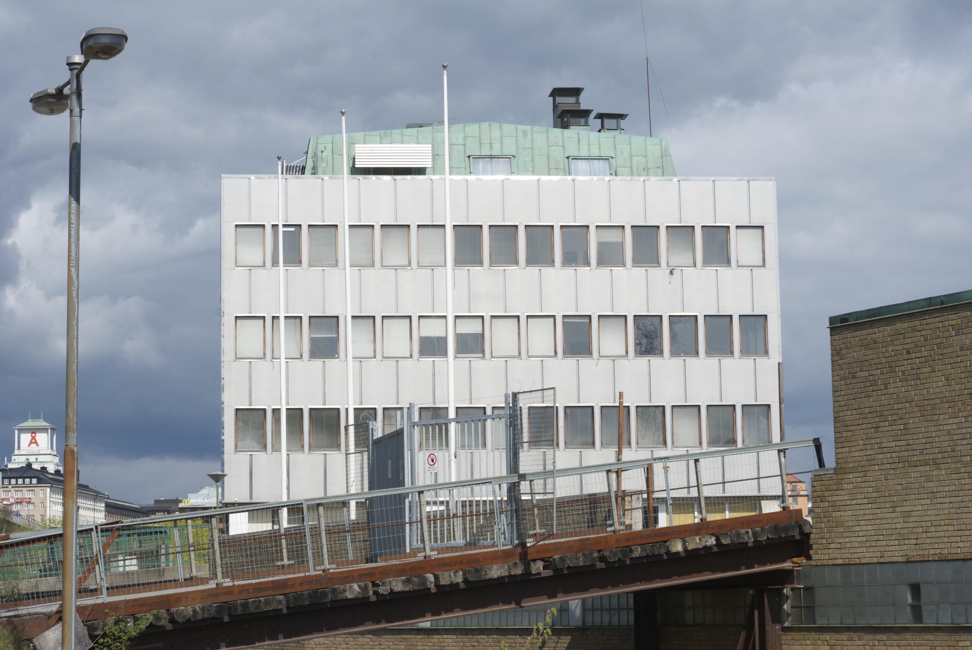 Fredriksdal